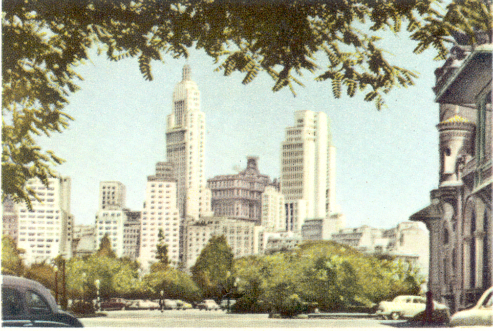 Obra que integra o acervo do Museu Paulista da USP. Coleção Werner Haberkorn